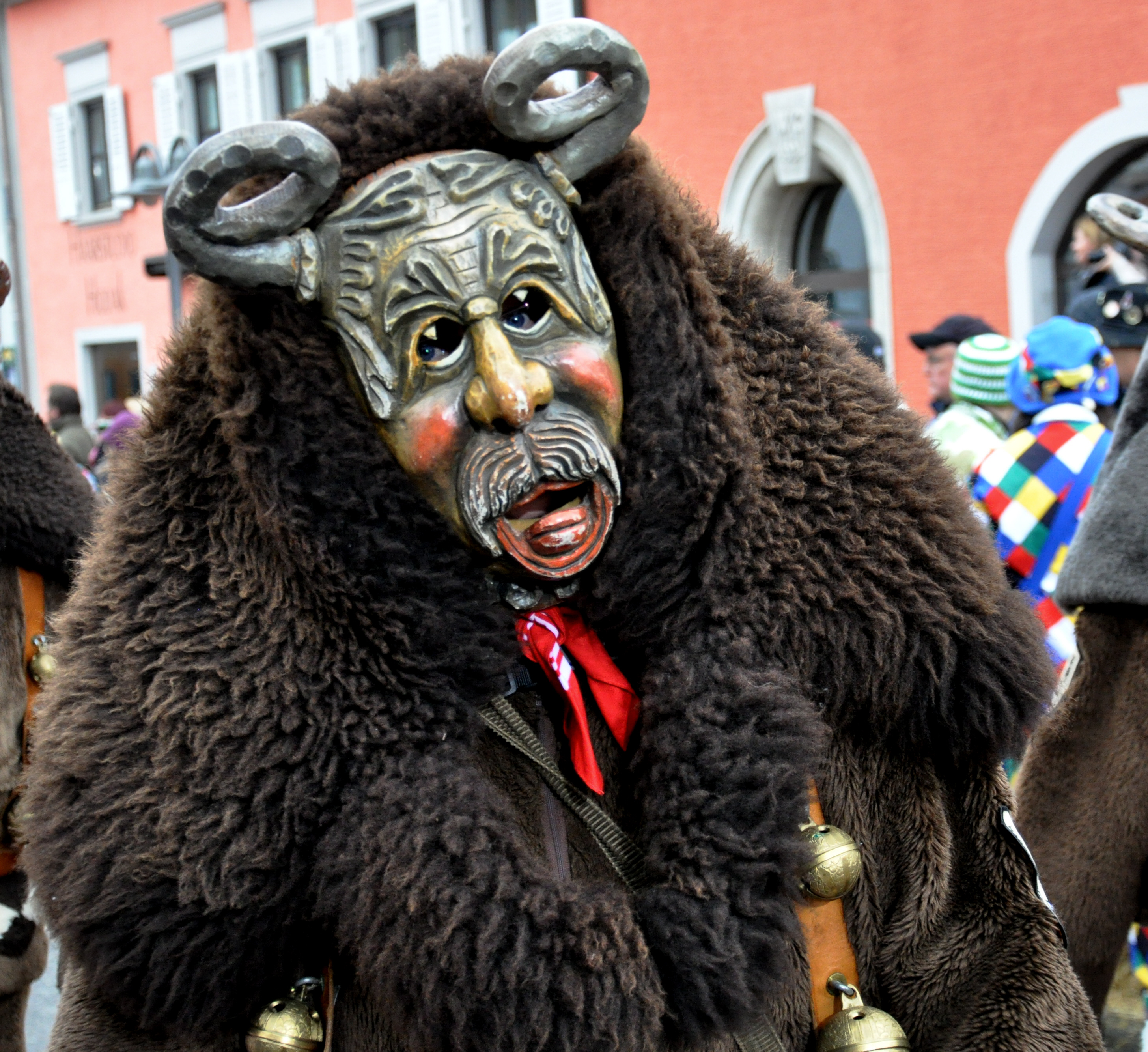 Narrenzunft Rottenburg; Narrenfigur: Pompele Fotografiert beim Landschaftstreffen der Vereinigung Schwäbisch-Alemannischer Narrenzünfte (VSAN) 2014 in Tettnang; Narrensprung am Sonntag, 16. Februar 2014